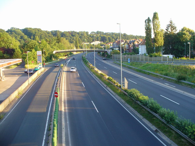 Die Bundesstraße 3 innerhalb von Marburg ("Stadtautobahn").